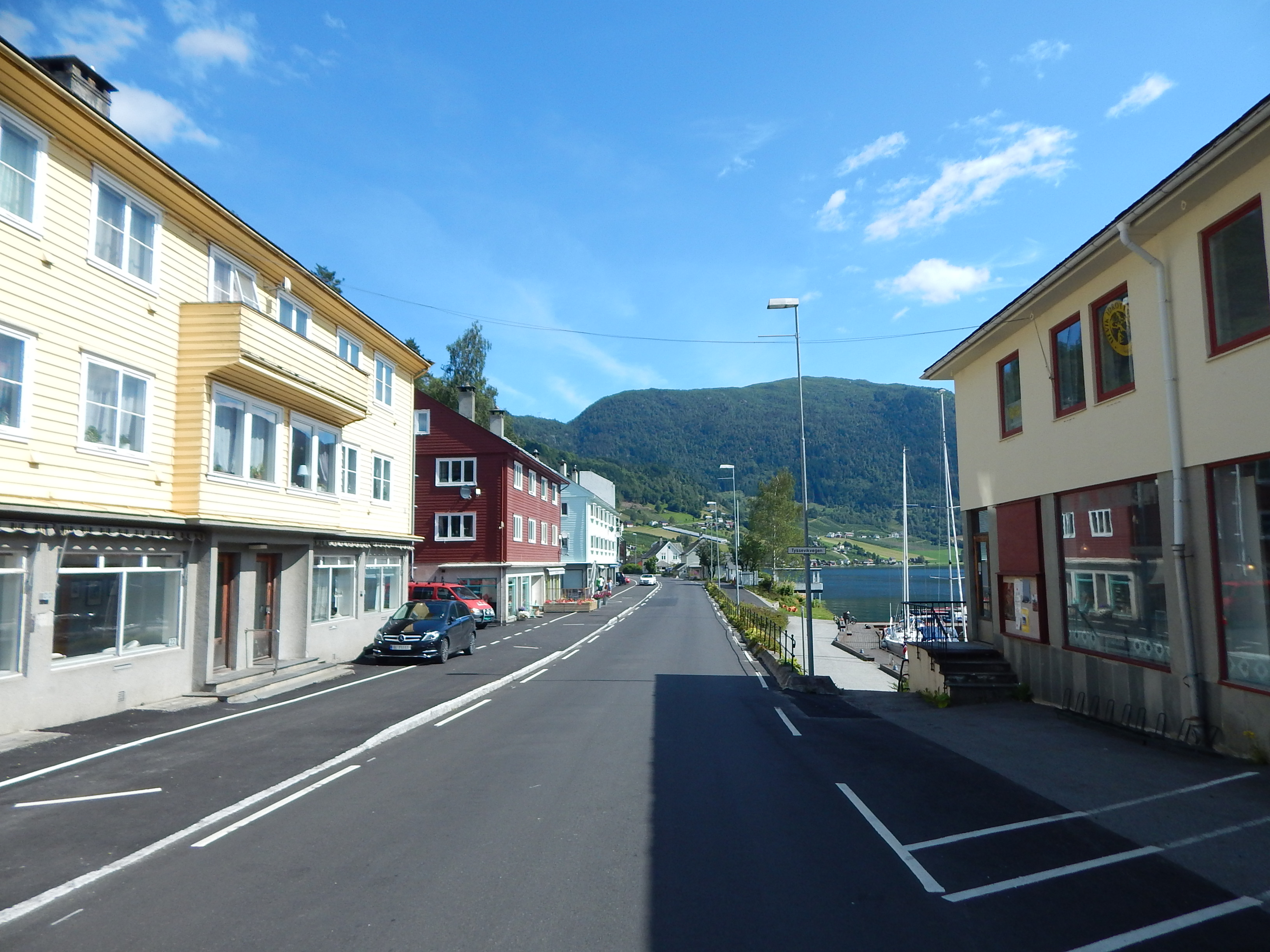 Osavegen (fylkesvei 300) gjennom Ulvik sentrum)